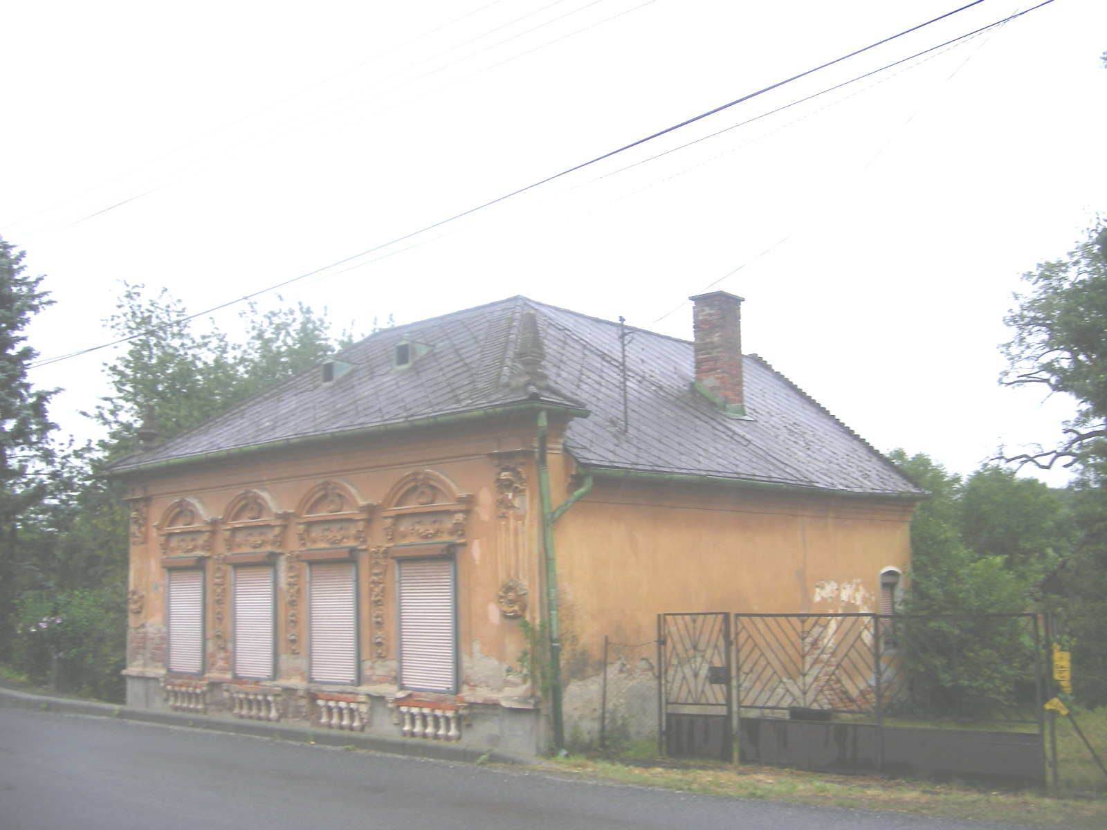 Hegyhátsál